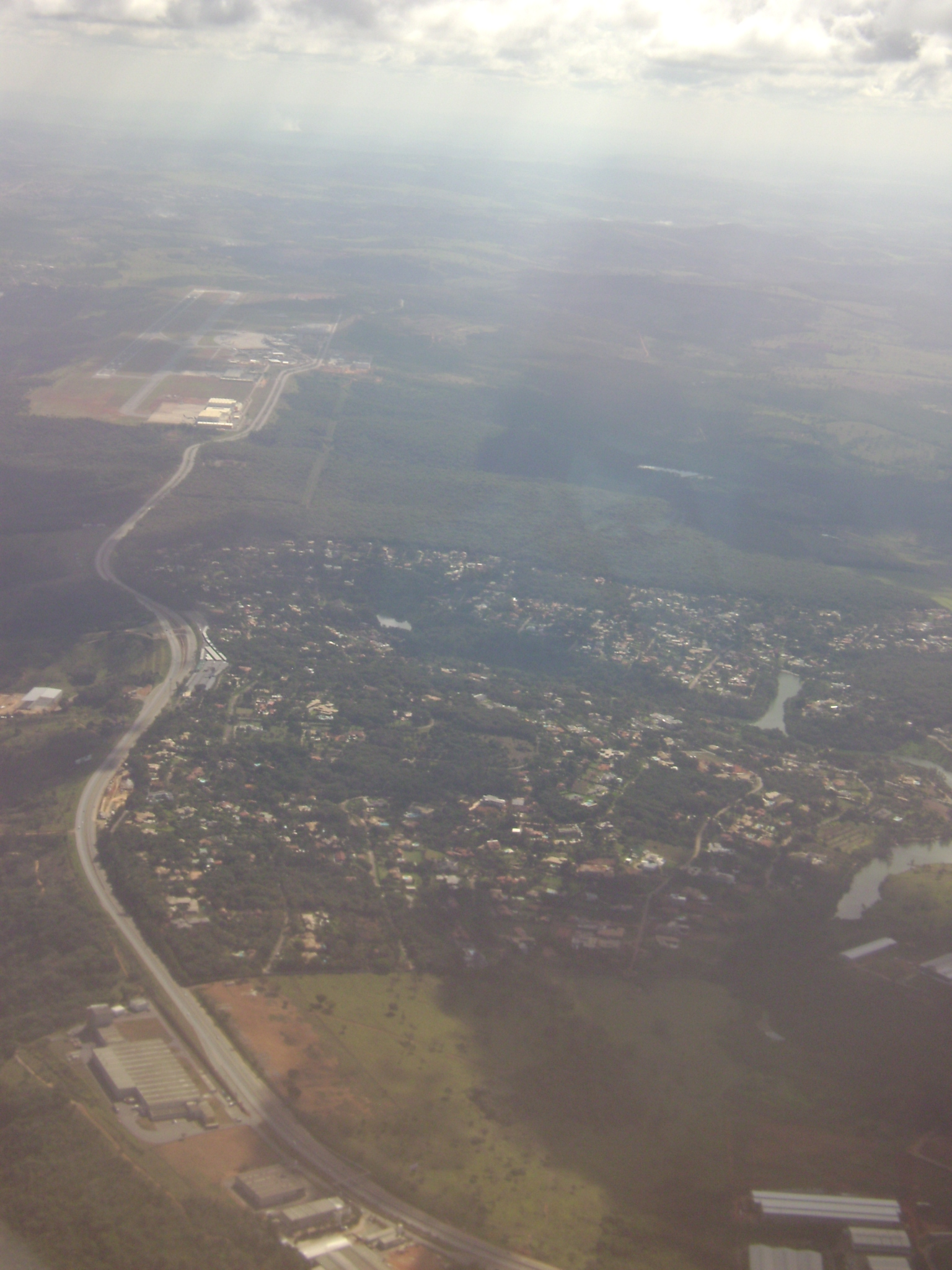 Linha Verde vista de um avião próximo ao Aeroporto Internacional de Belo Horizonte - Confins.